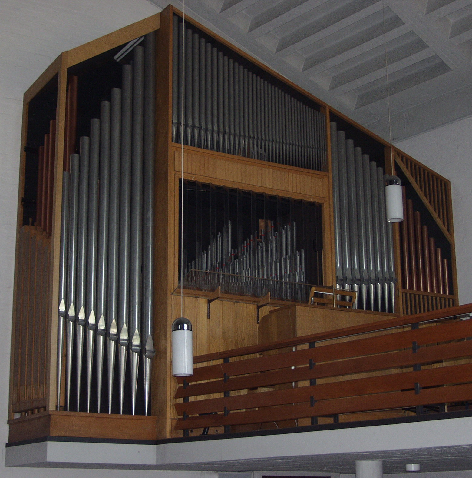 Orgel der Pfarrkirche Herz Jesu